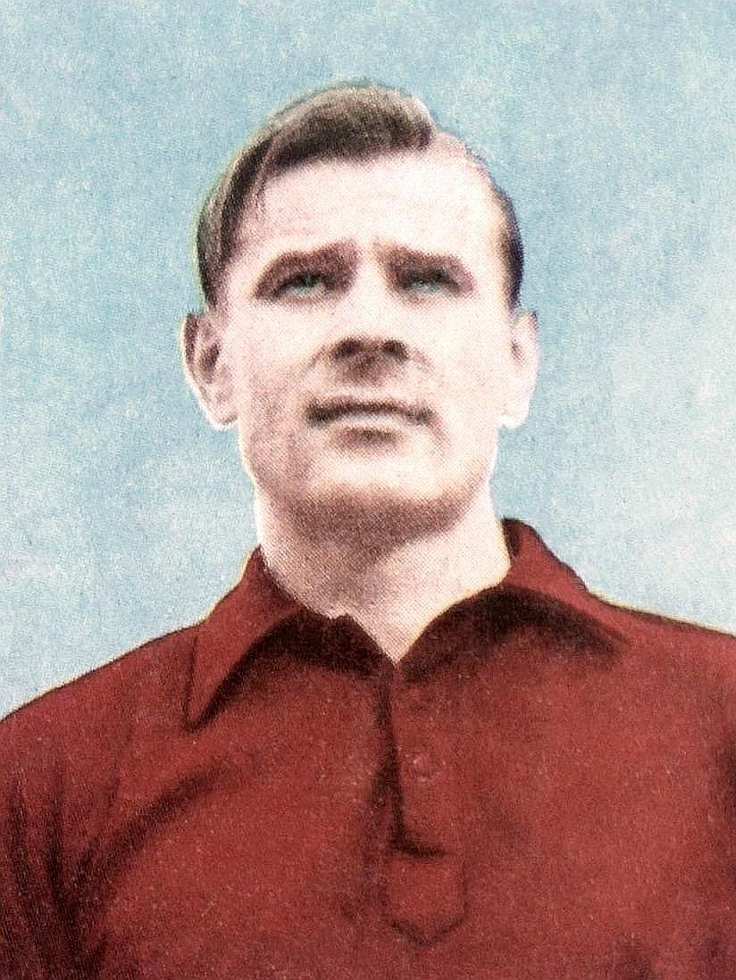 Lev Jascin Sticker/Figurina Panini Campioni Dello Sport 1966/67 Russia